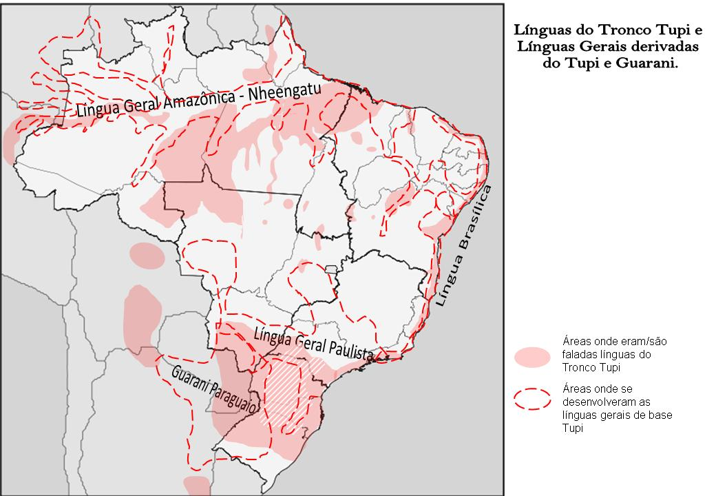 Mapa